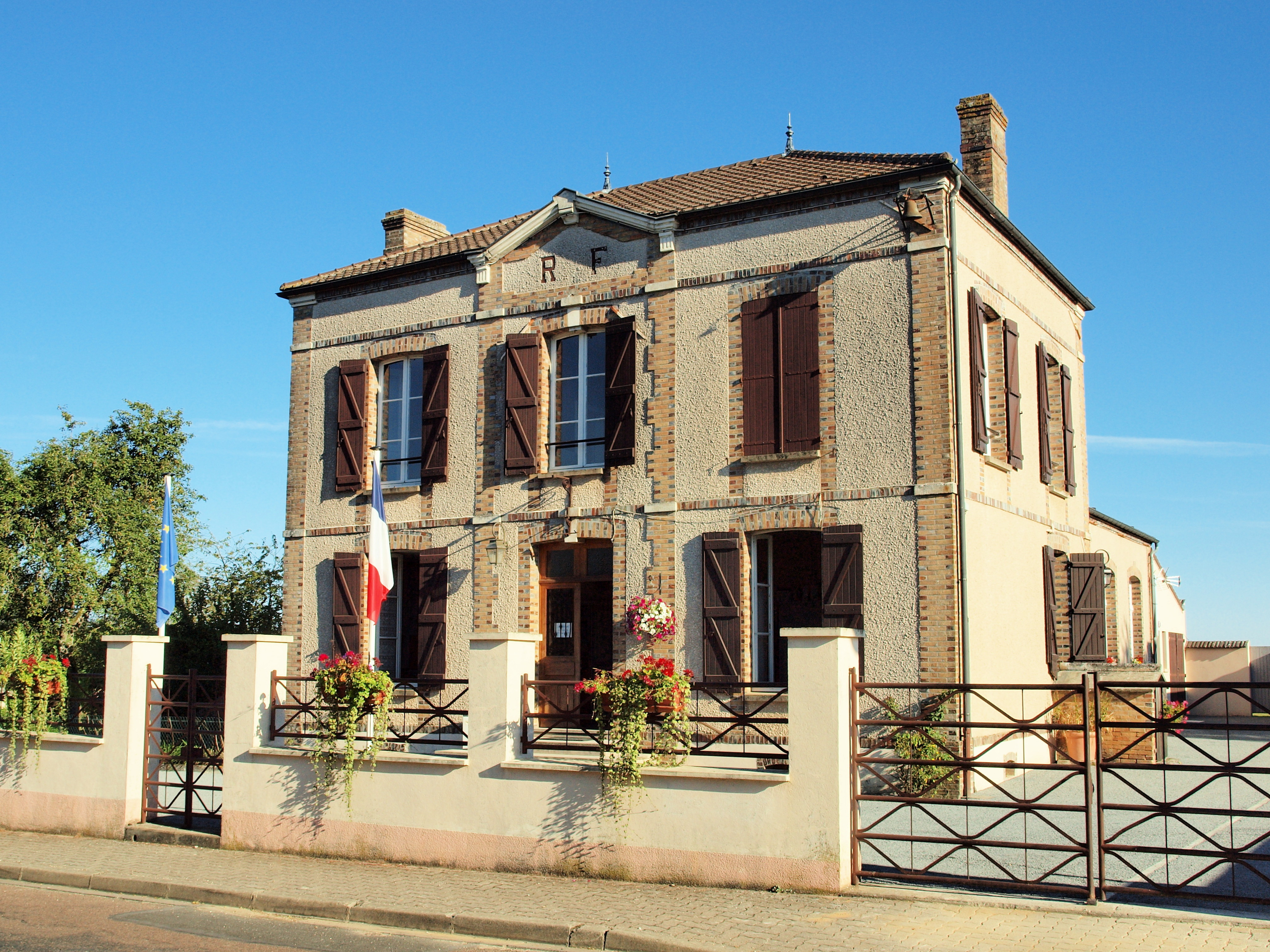 Villeneuve-la-Dondagre (Yonne, France)